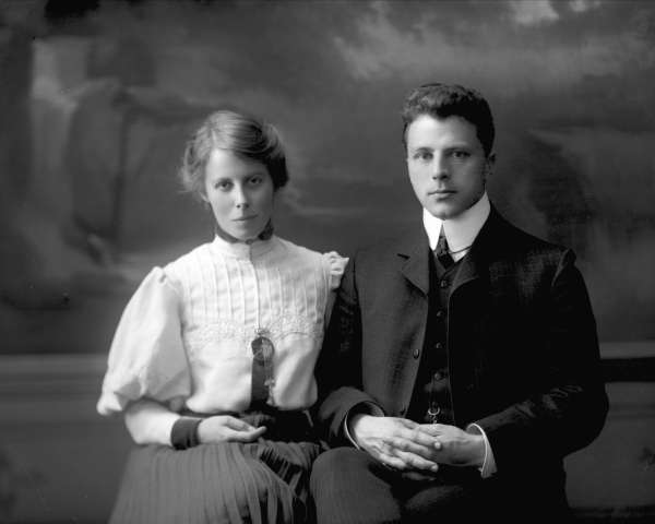 Nikolai Nissen Paus og hustru Sofie Amalie Paus